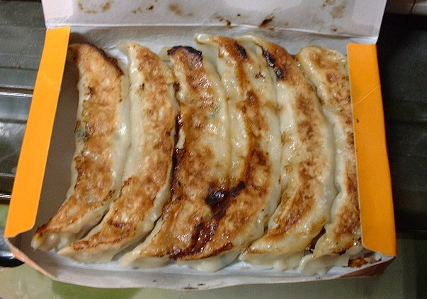 御座候店舗の一部で販売されている「ジャンボ焼餃子」